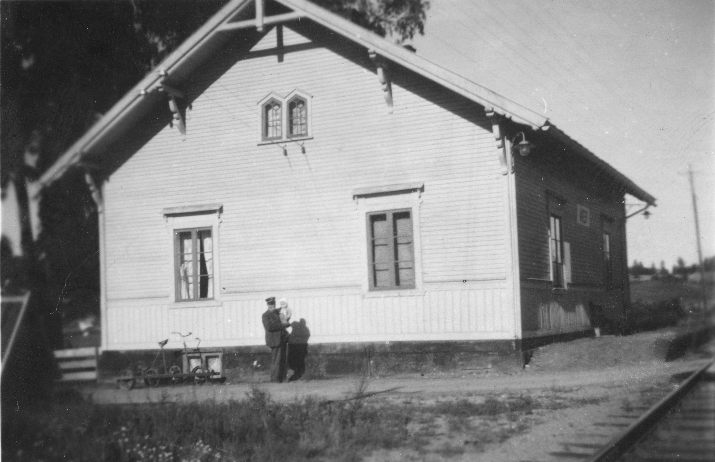 Åker stoppested på Rørosbanen. Ukjent fotograf. Fra Domkirkeoddens samling i Digitalt museum.